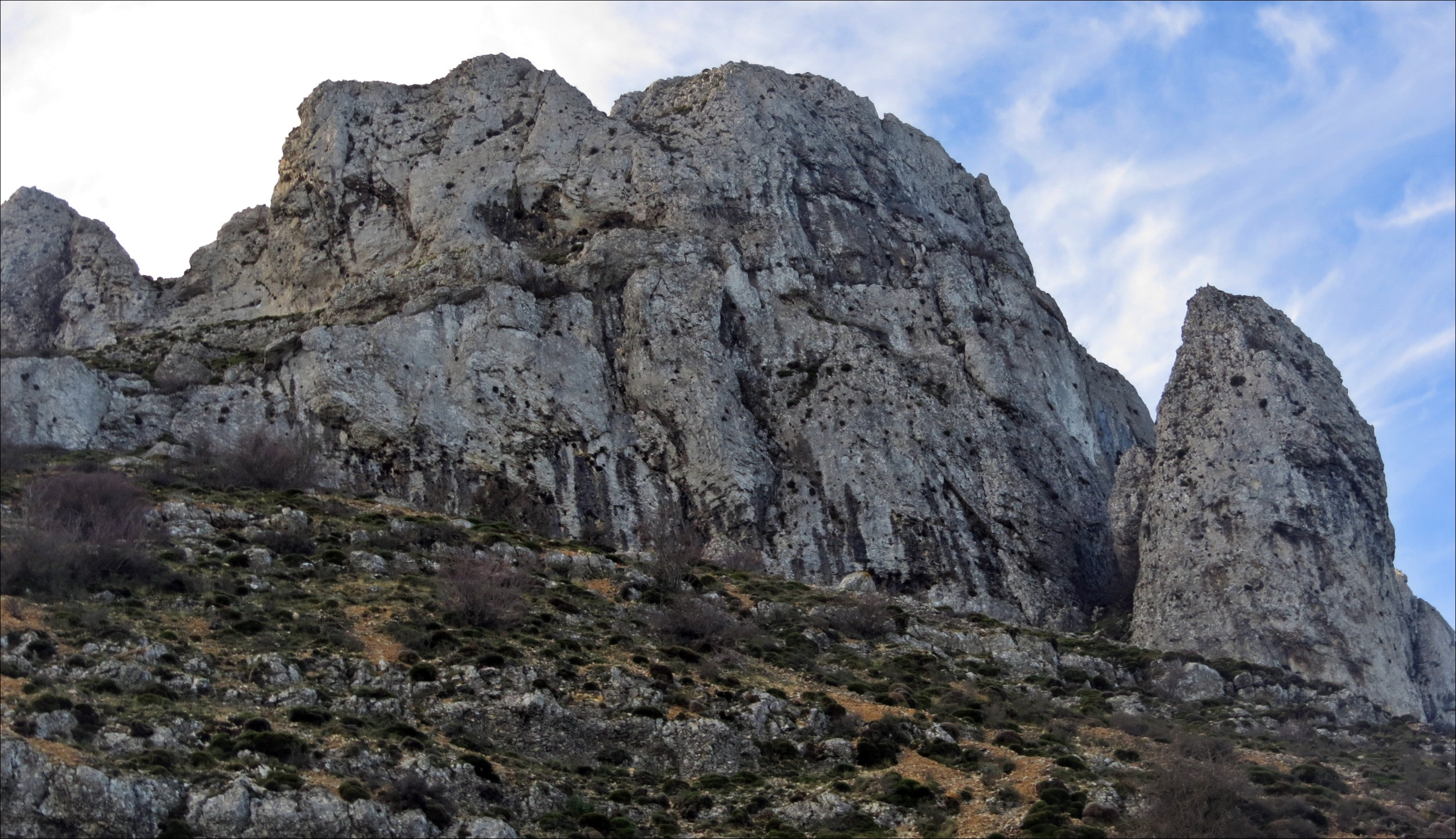 Cnachales y frares en Aitana